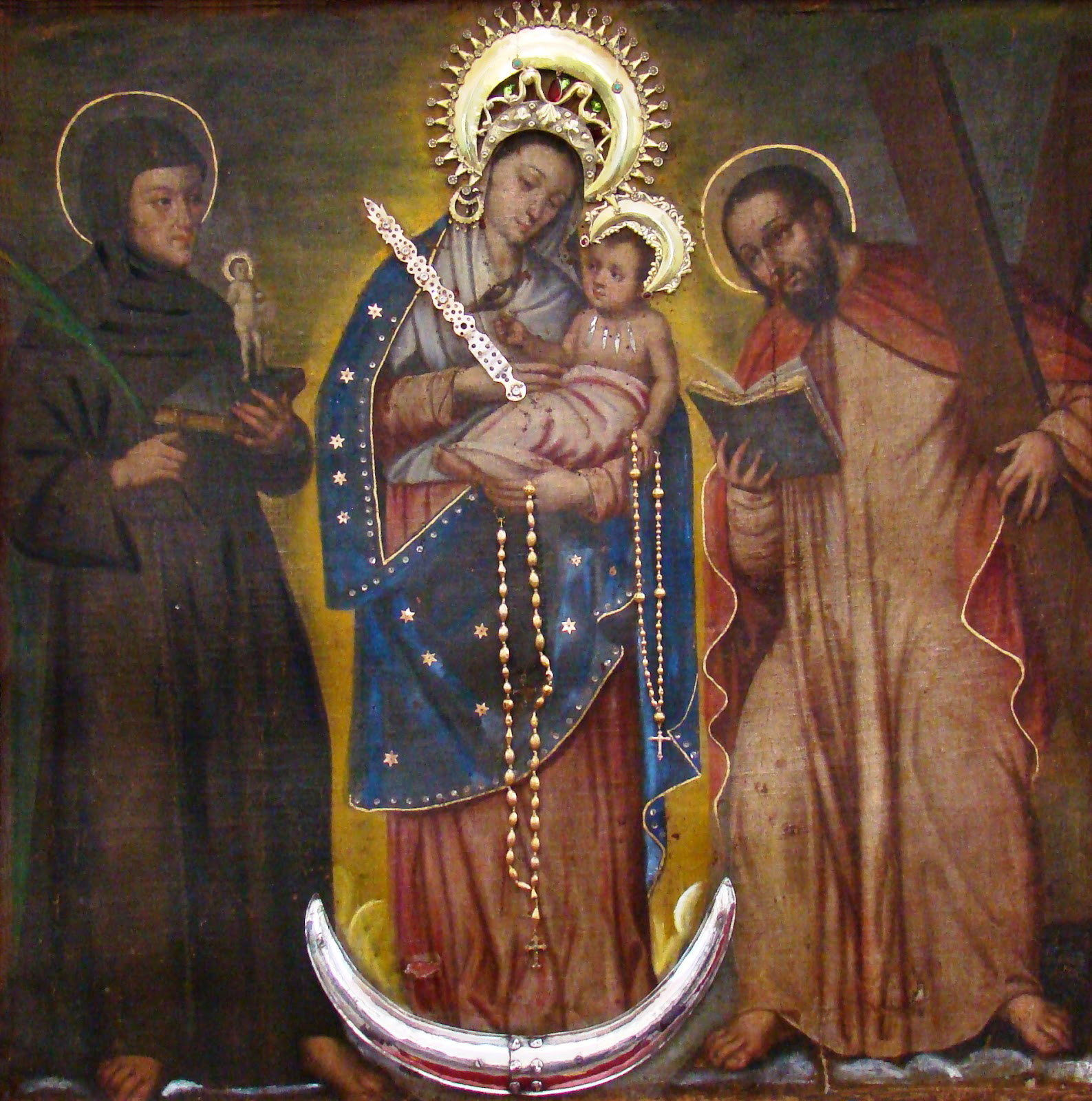 Fotografía tomada directamente al lienzo de la Virgen del Rosario de Chiquinquirá de Lobatera.